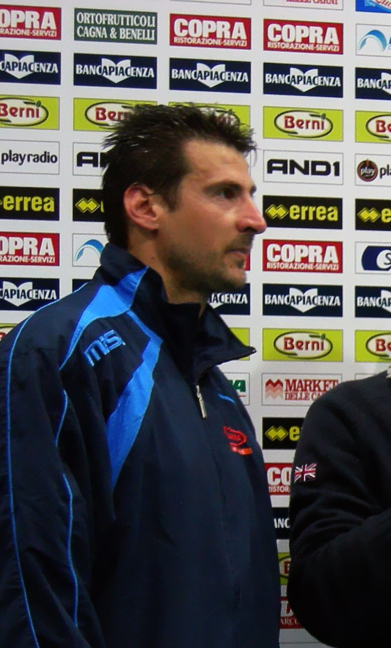 Foto scattata durante un incontro tra Piacenza e Latina